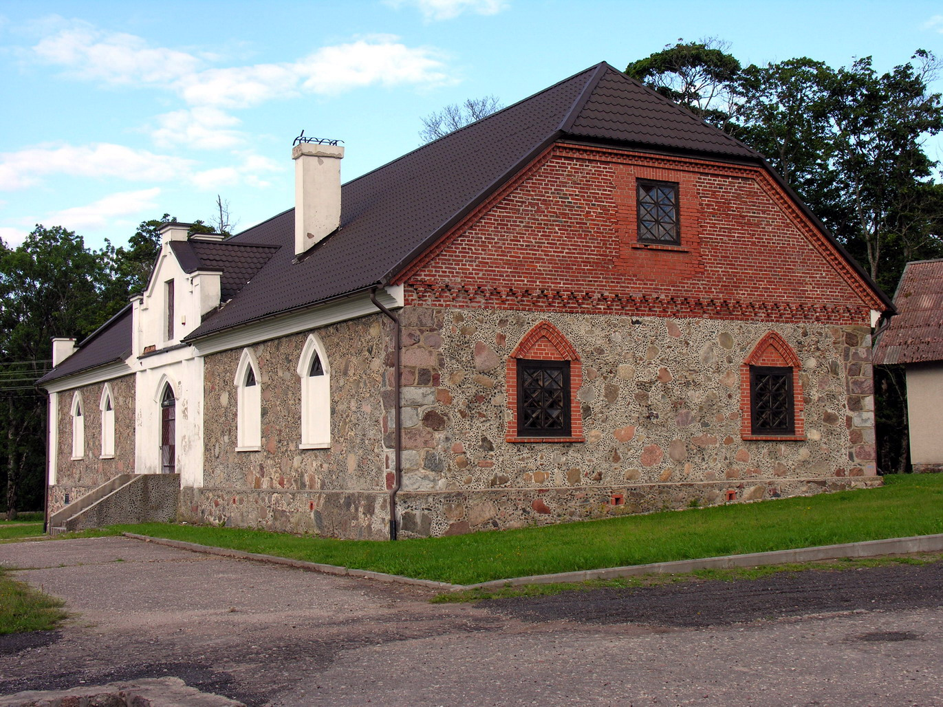 Žemaitėška: Platelē (lt. Plateliai). Plateliū dvara svėrns. Žemaitėjės naciuonalėnis parks Puortegrapėje Algirda, 2007-07-23, Žemaitėjė